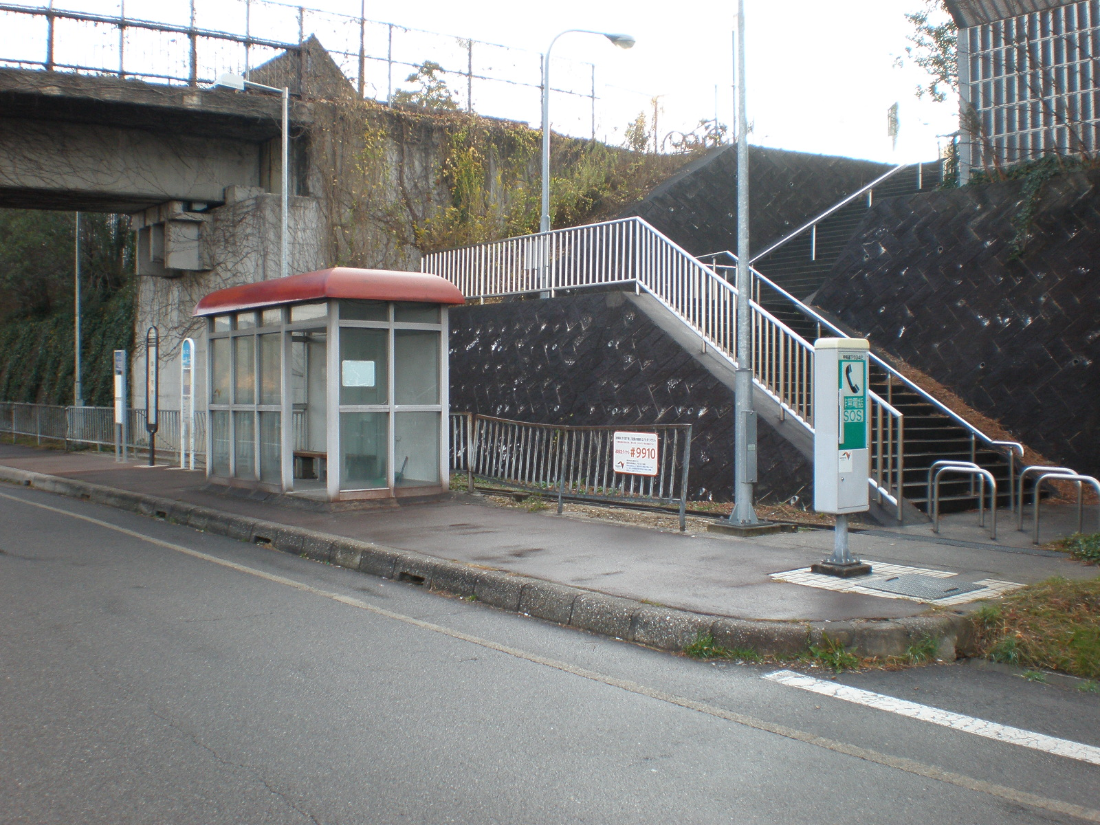 愛知県小牧市の桃花台ニュータウン内にある中央自動車道上の高速バス停留所・桃花台バスストップ